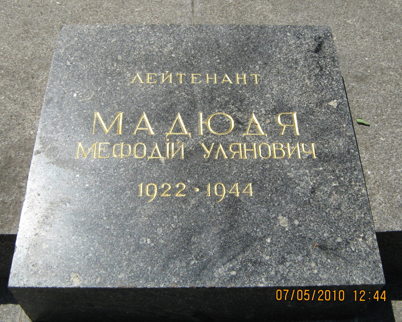 Меморіал Вічної Слави.